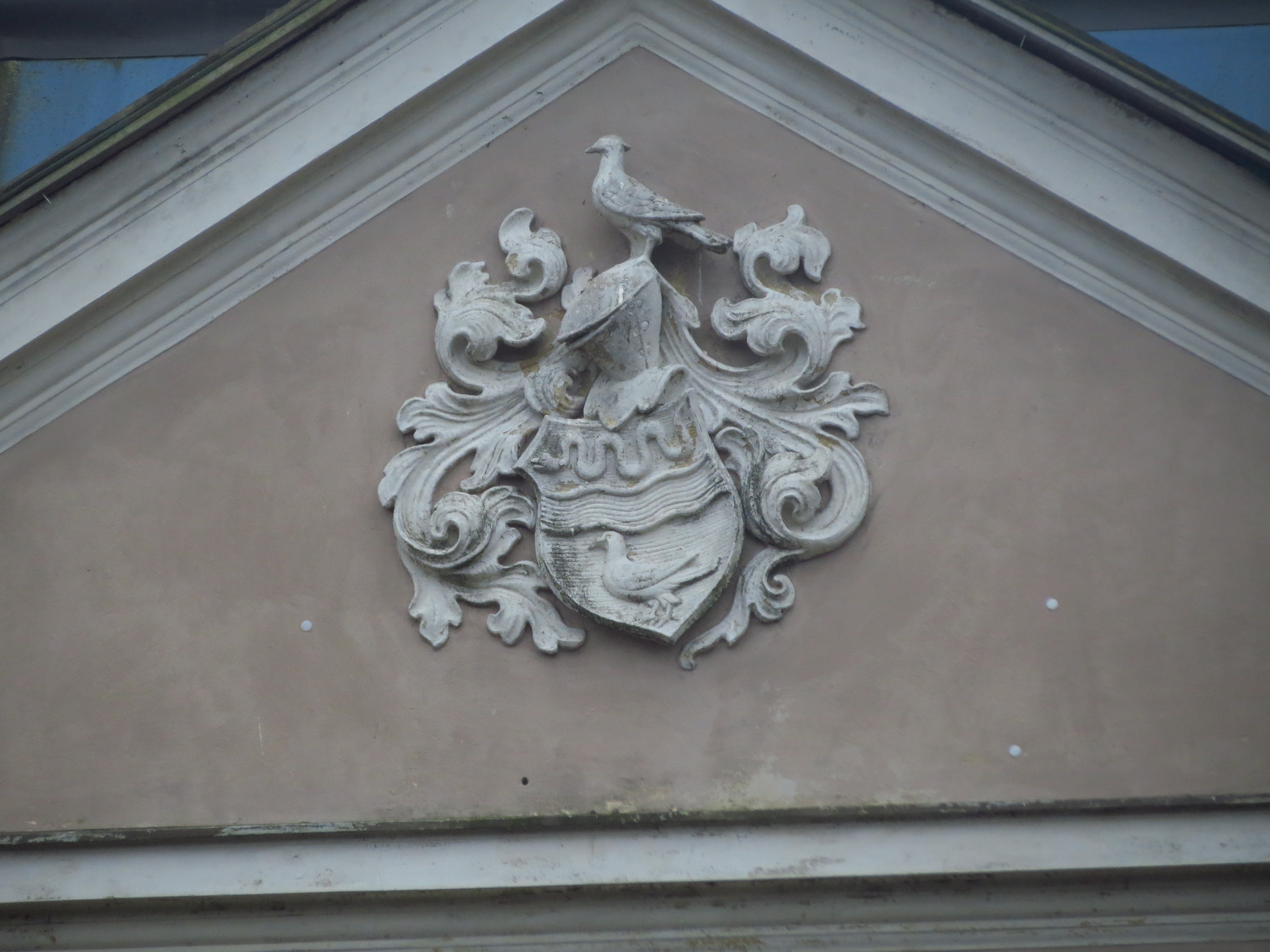 Gutshaus Götschendorf, Tiedmann-Wappen im Zwerchhaus, Seeseite, Götschendorf, Gem. Milmersdorf, Lkr. Uckermark, Brandenburg